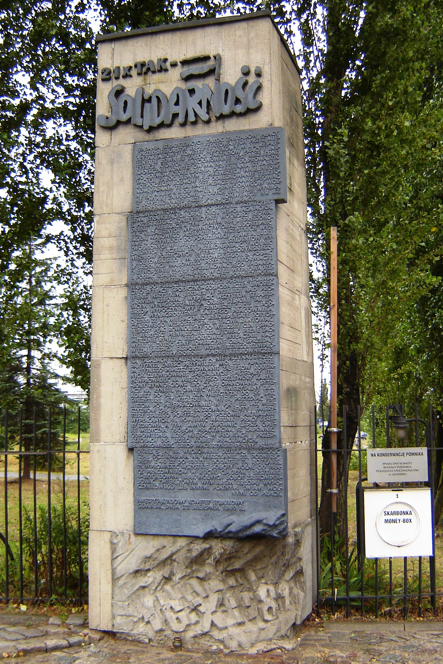 Stelle mit den 21 Solidarnosc-Forderungen in Danzig